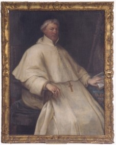 schildering van Servaes Vaes